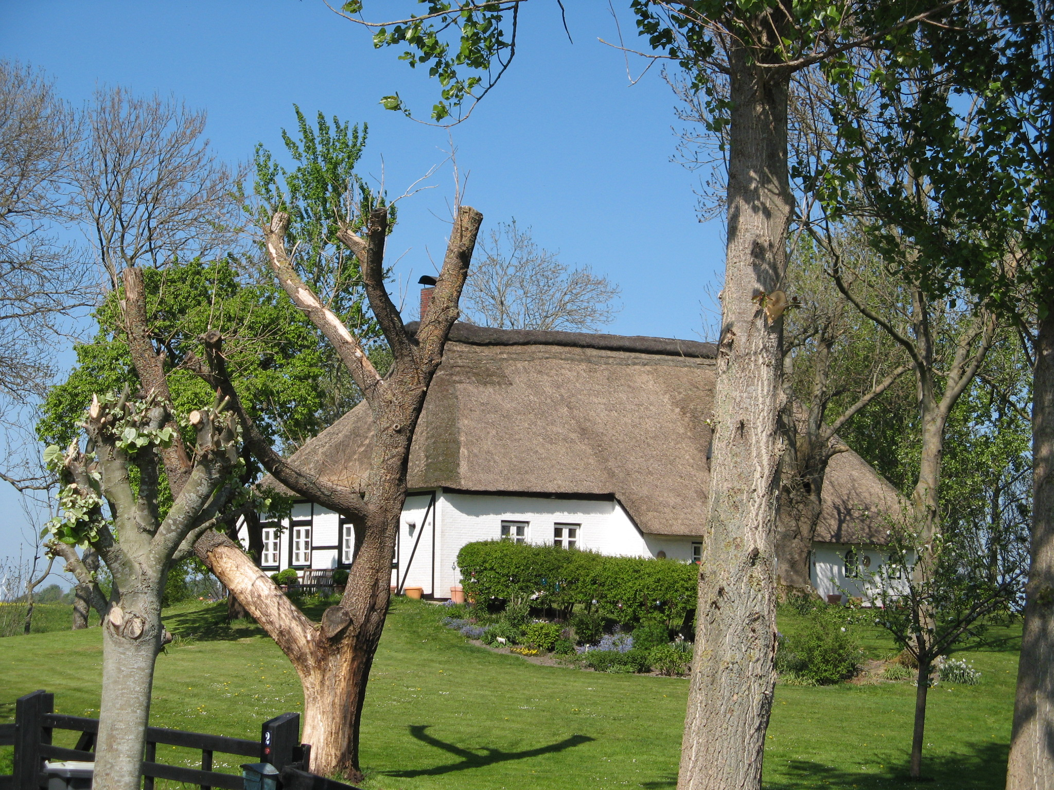 house in tödienwisch, oesterwurth Author: Dirk Ingo Franke